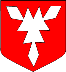 De gueules à une feuille d'ortie d'argent